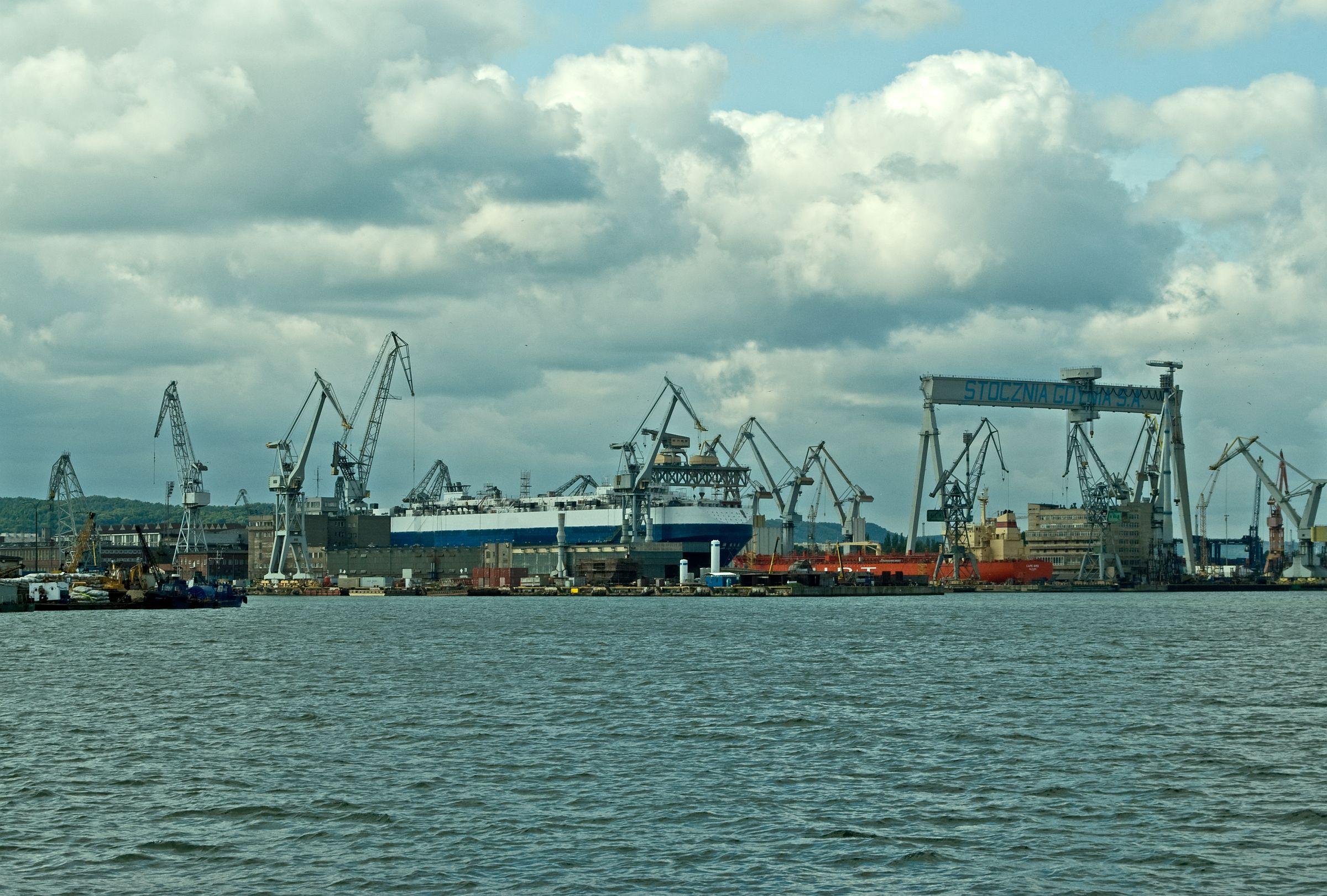 Stocznia Gdynia S.A.